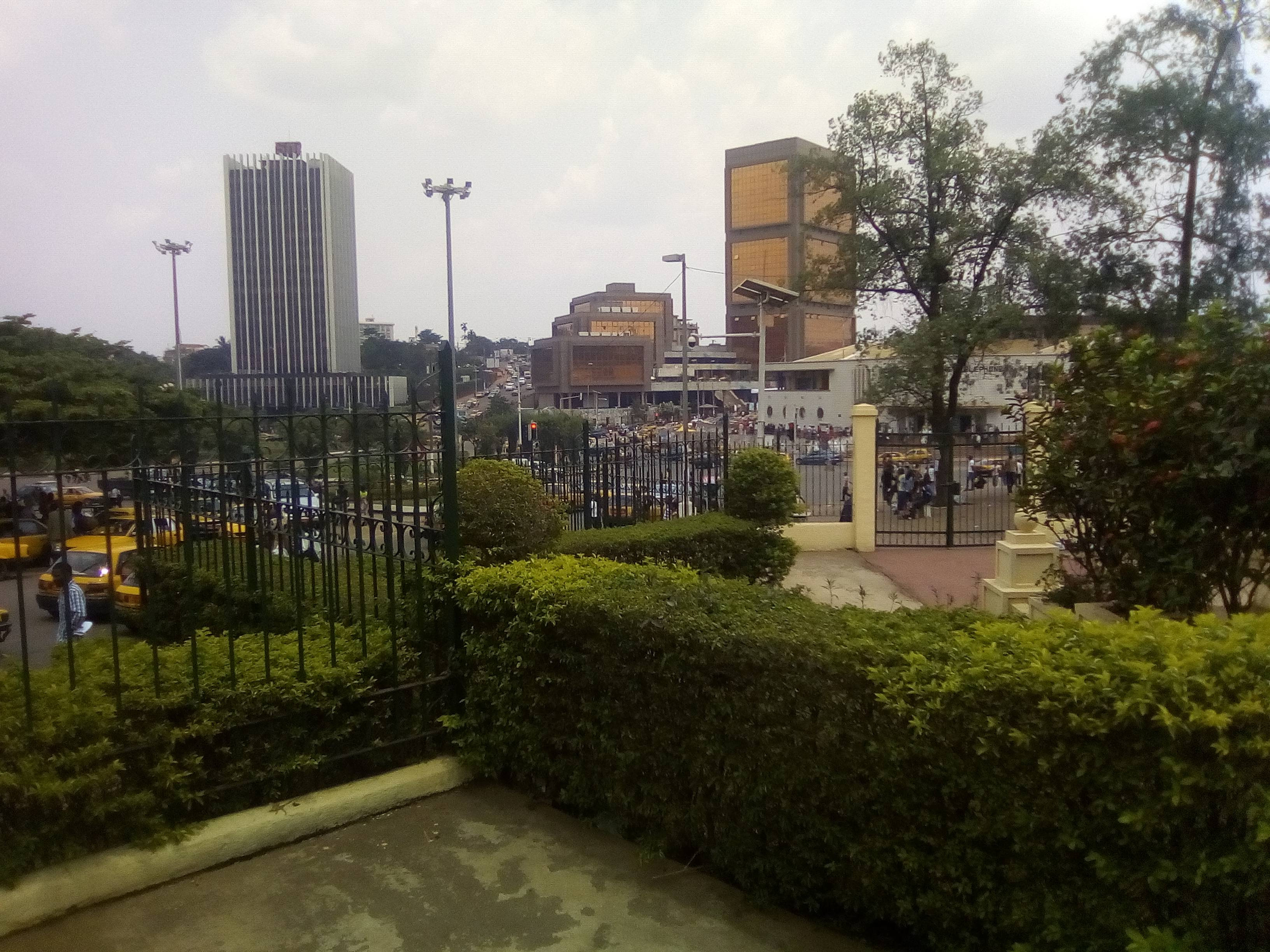 Le centre ville de Yaoundé, vue du Monument du Colonel Leclerc